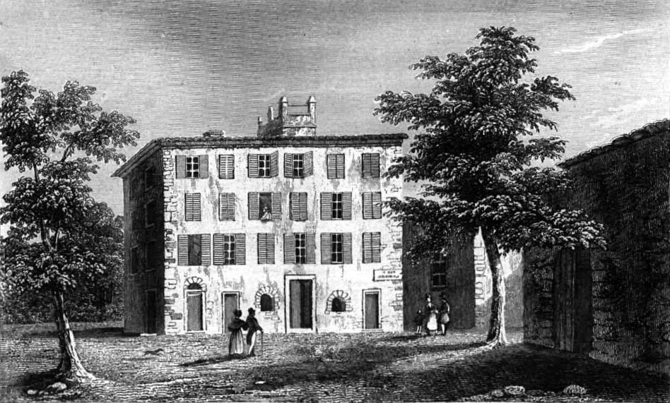 Image en provenance du livre : Eusèbe Girault de Saint-Fargeau, Guide pittoresque du voyageur en France, contenant la statistique et la description complète des quatre-vingt-six départements, orné de 740 vignettes et portraits gravés sur acier, de quatre-vingt-six cartes de départements et d'une grande carte routière de la France, par une Société de gens de lettres, de géographes et d'artistes, Paris, F. Didot frères, 1838, 6 volumes in-8° (BNF : 8-L25- 46). Volume III Didot frères, 1838. Route de Paris à Nice traversant les départements de l'Isère, des Hautes-Alpes, des Basses-Alpes et du Var. auteurs dessins : Rauch (ou autre) auteurs gravures : Skelton fils, Schroeder, Bishop (ou autre)